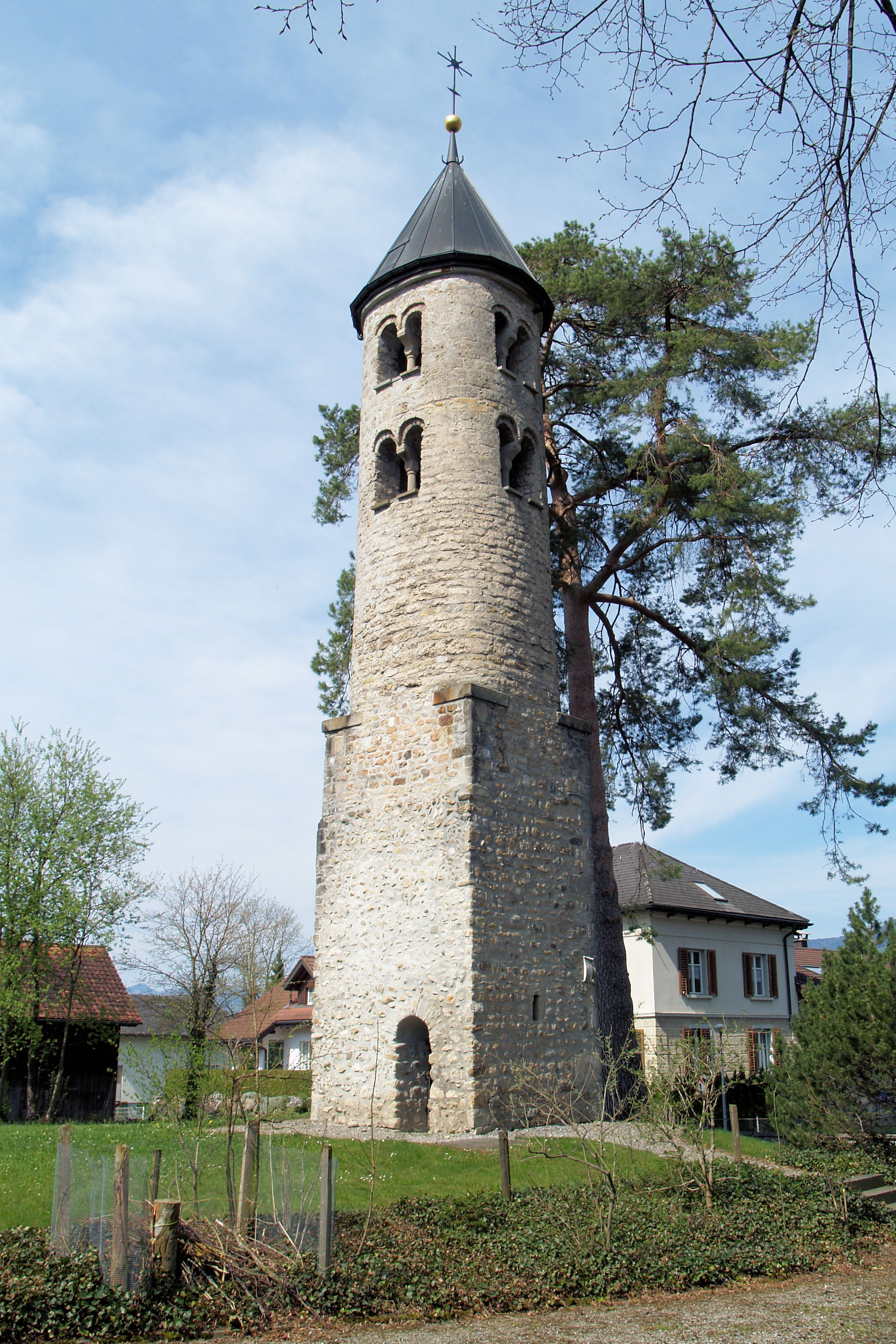 Der Gallusturm in Schänis. Beim romanischen Turm handelt es sich um die Überreste der 1824 abgebrannten und danach abgerissenen Pfarrkirche St. Gallus.